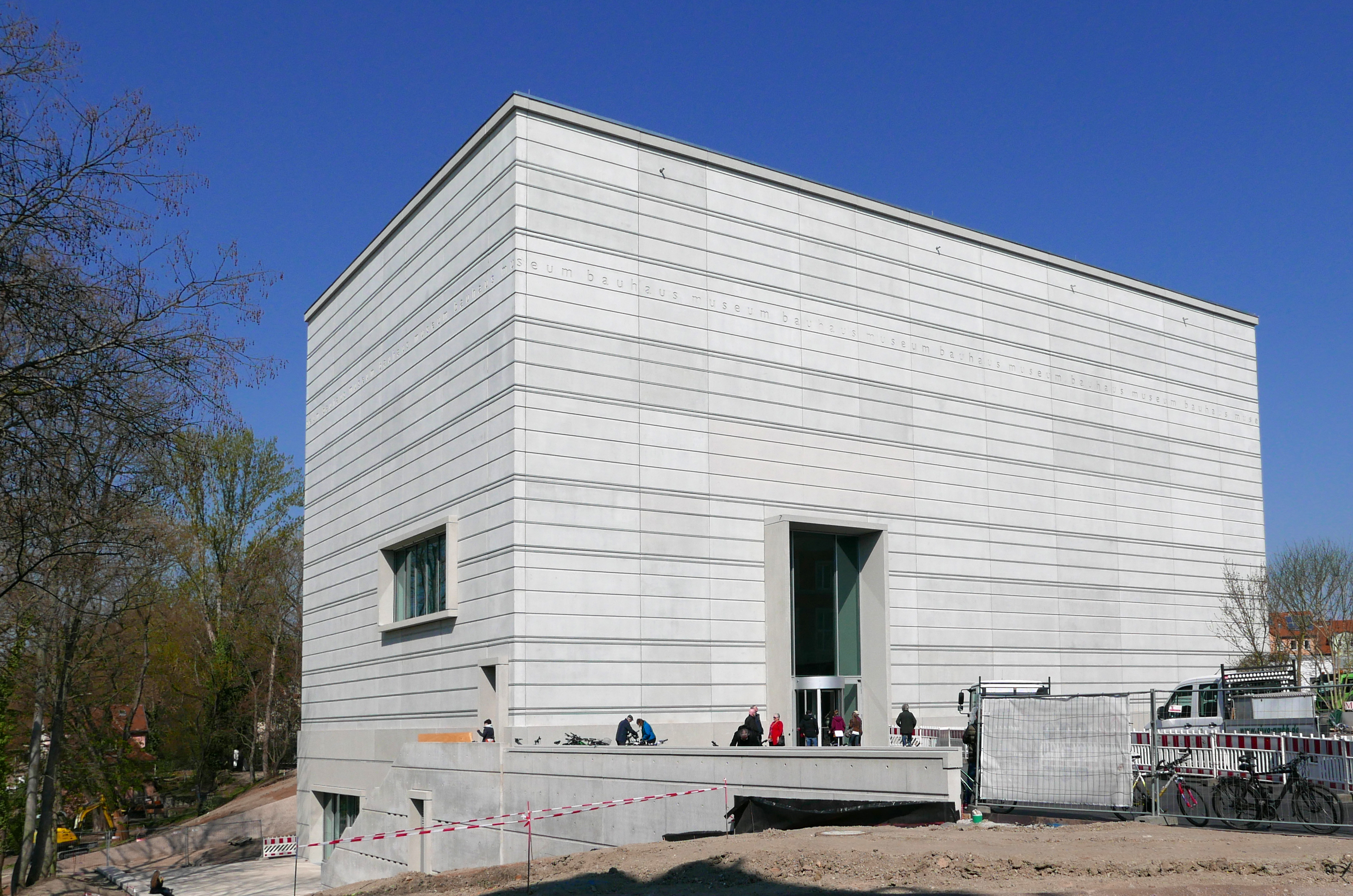 Neubau des Bauhaus-Museums in Weimar, April 2019, kurz nach der Eröffnung